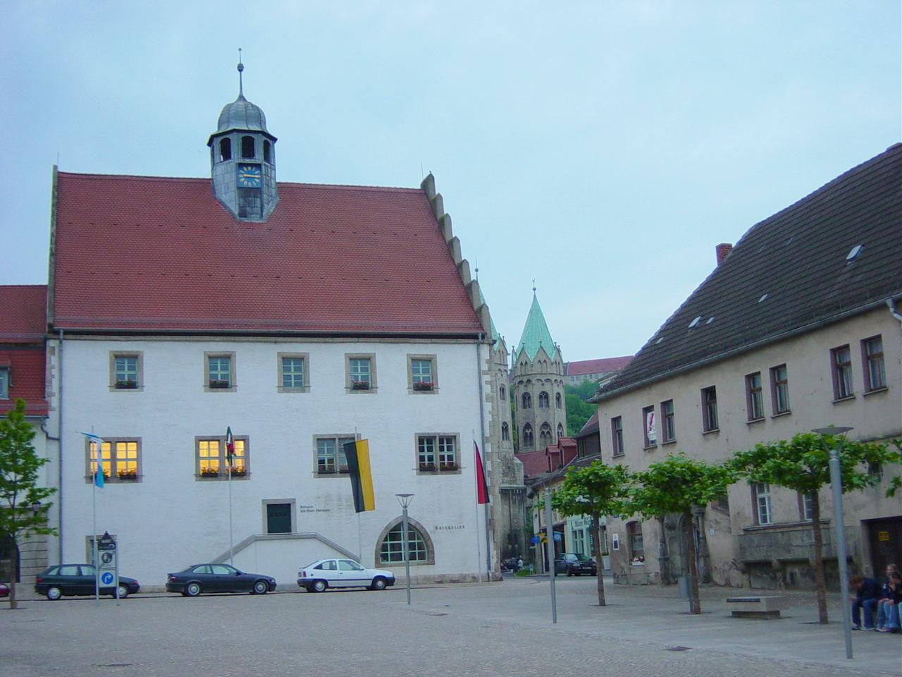 Freyburg/Unstrut, Rathaus